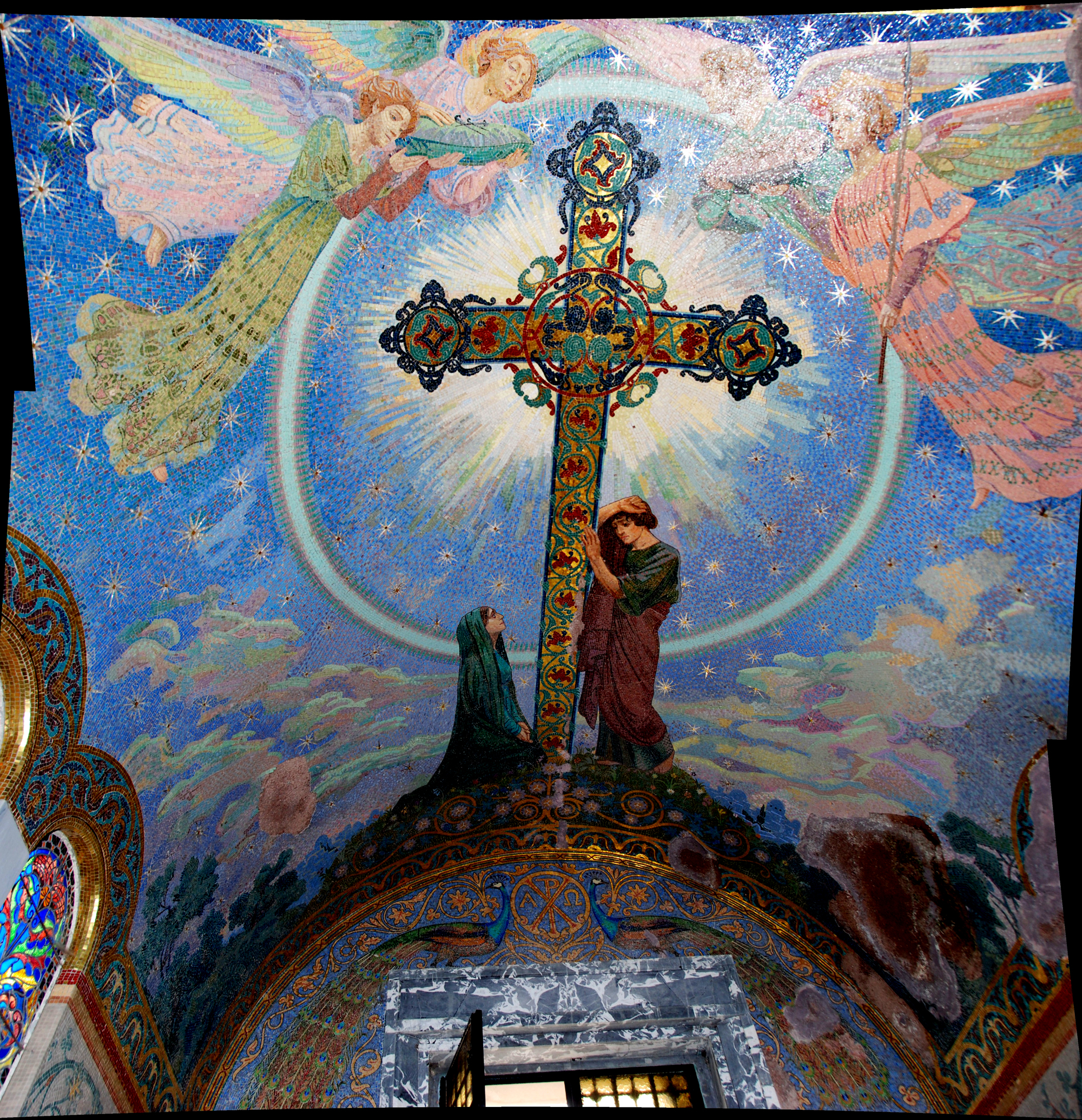 Bourgogne mausoleum - Mosaic work by RENE-MARTIN - Glorious cross